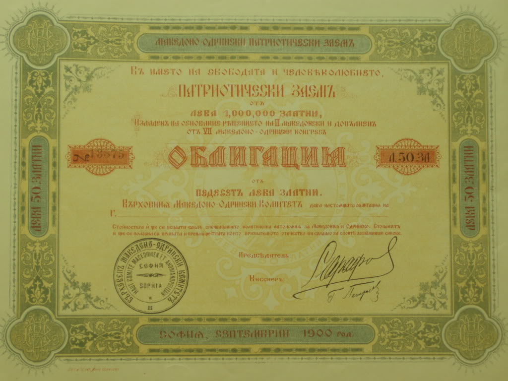 Облигация на ВМОК с подписа на Борис Сарафов.